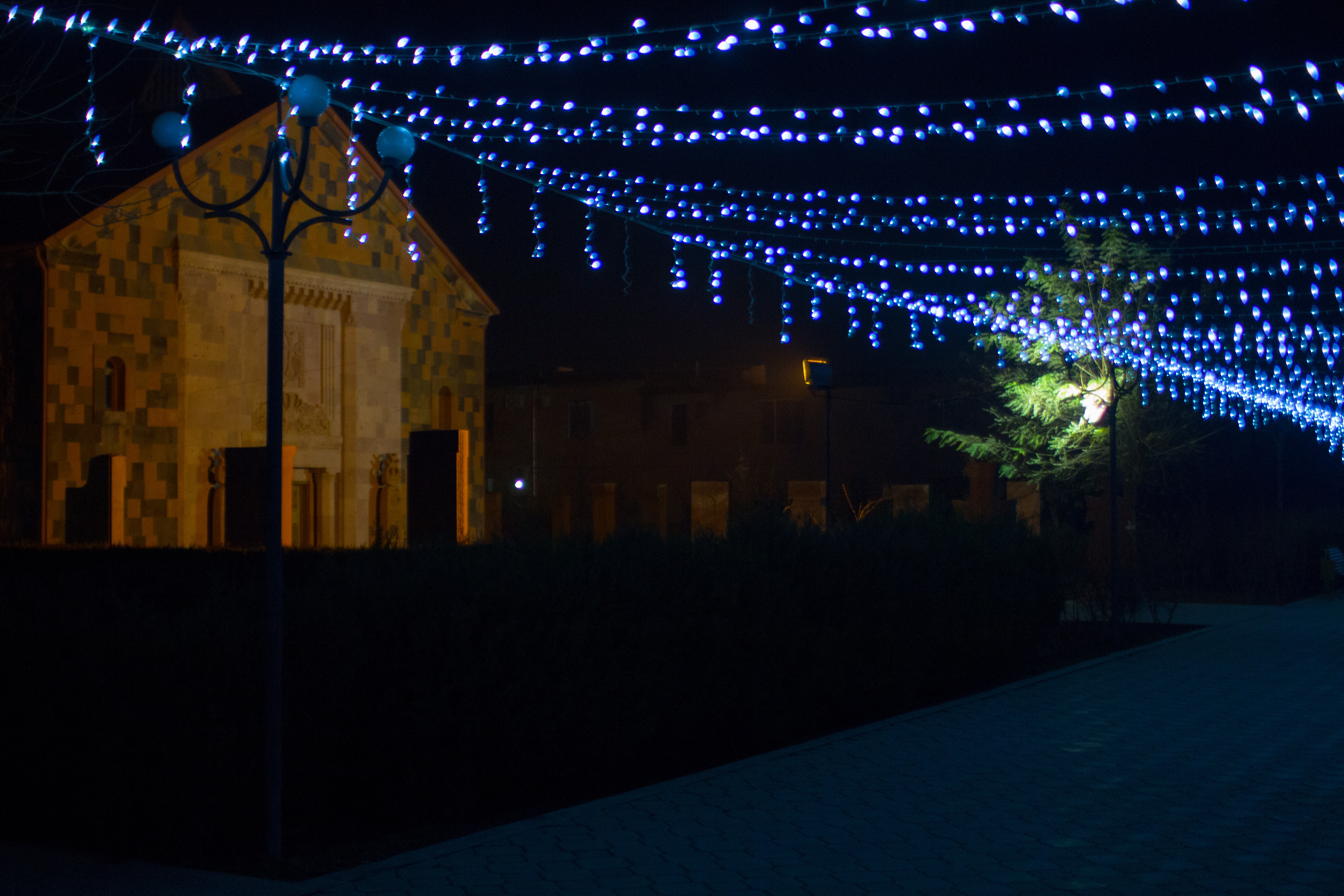 Արմավիր